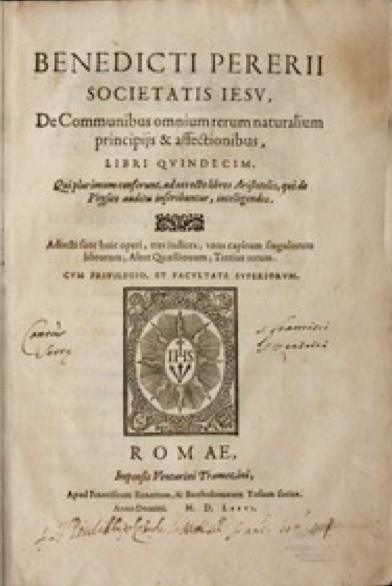 Benedicti Pererii Societatis Iesu. De communibus omnium rerum naturalium principiis et affectionibus libri quindecim. Romae, 1576